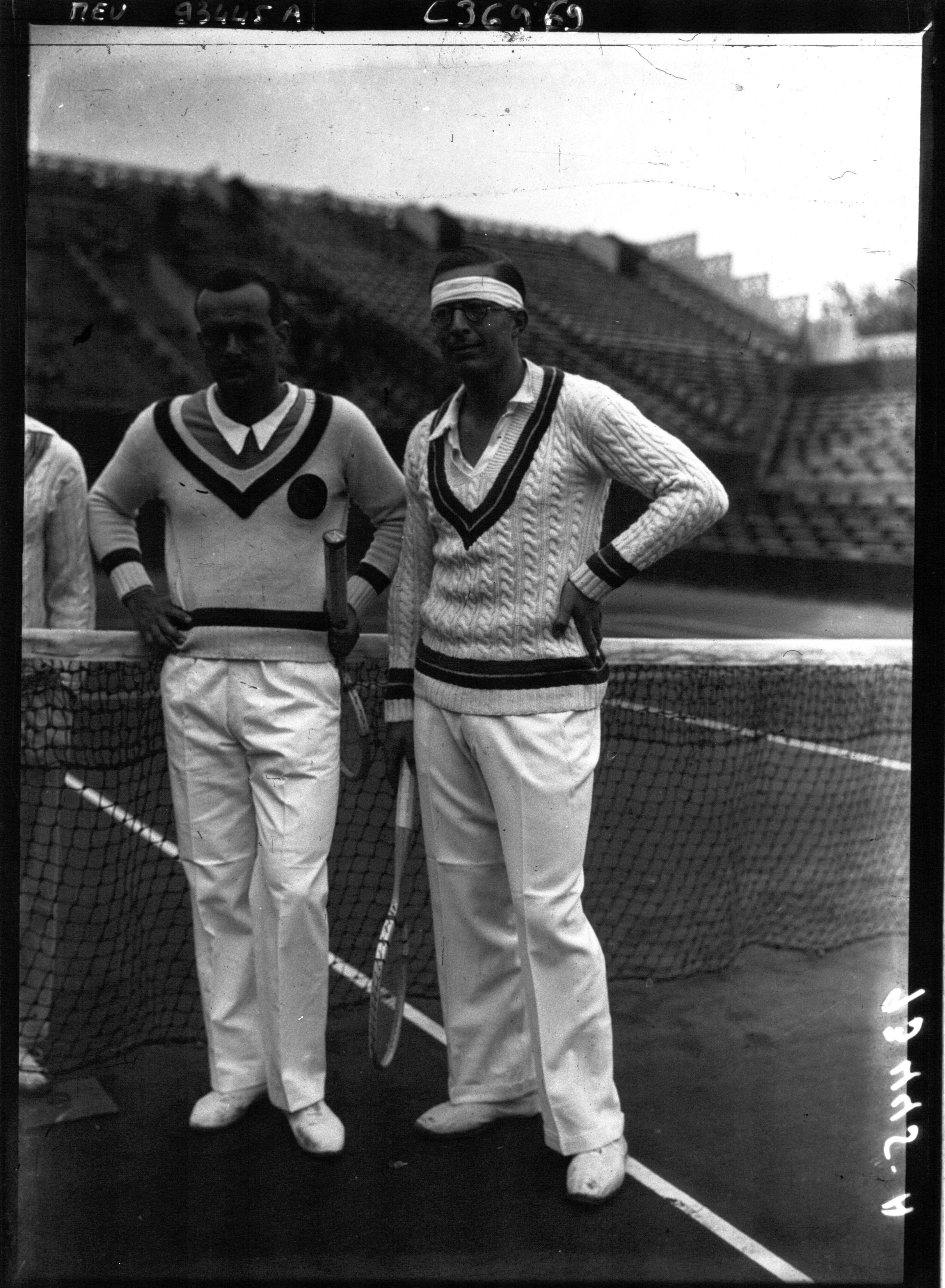 Championnats internationaux G. et P. Grandguillot (portrait à 3 m) (2) : [photographie de presse] / Agence Meurisse